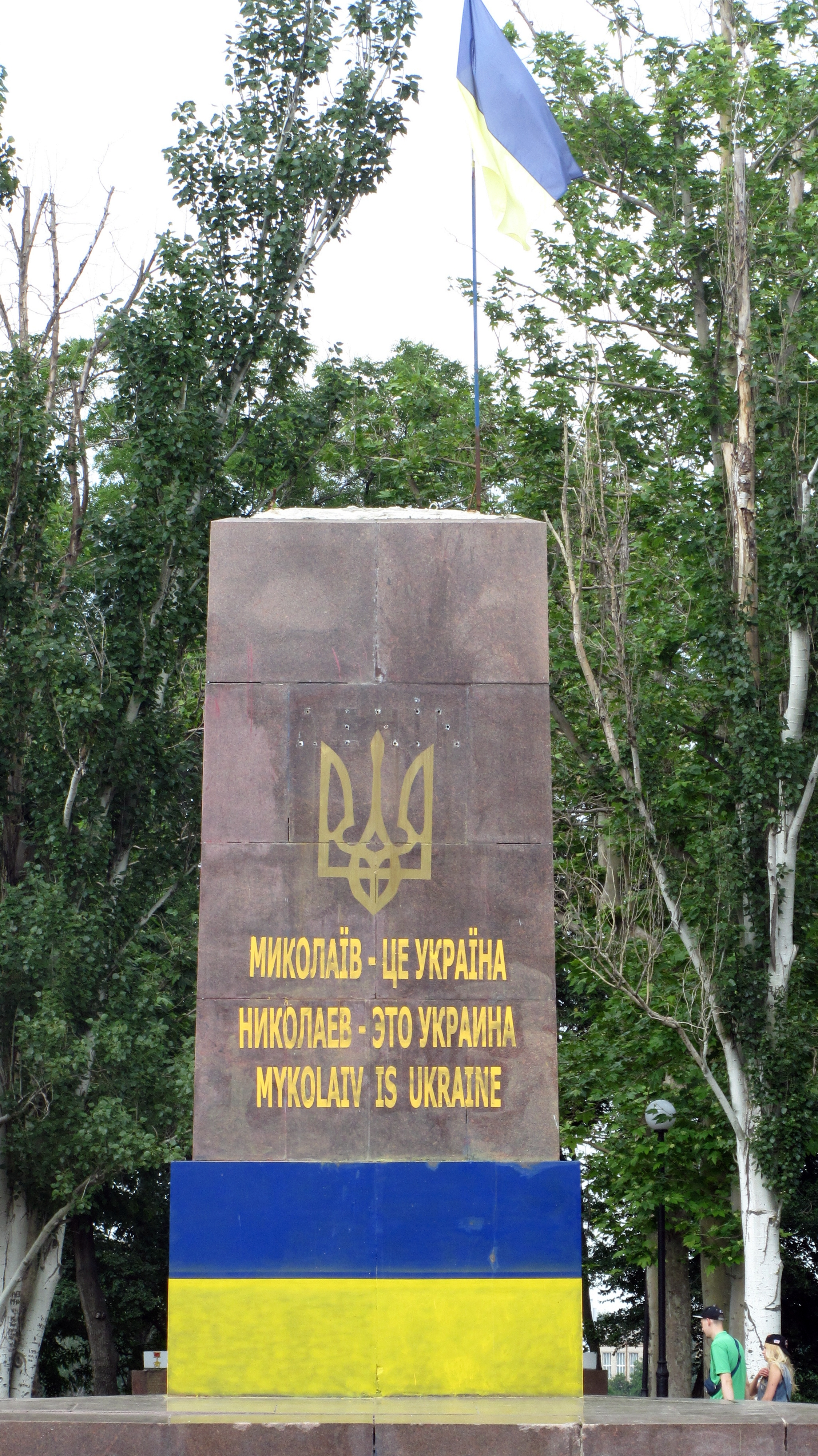 Пам'ятник В. І. Леніну (ск.: Ш. М. Мікотадзе, арх.: О. К. Марачинський, В. І. Добровольська, І. І. Пейсахіс, Семенова, Г. П. Скуратовська), Миколаїв, Соборна пл.